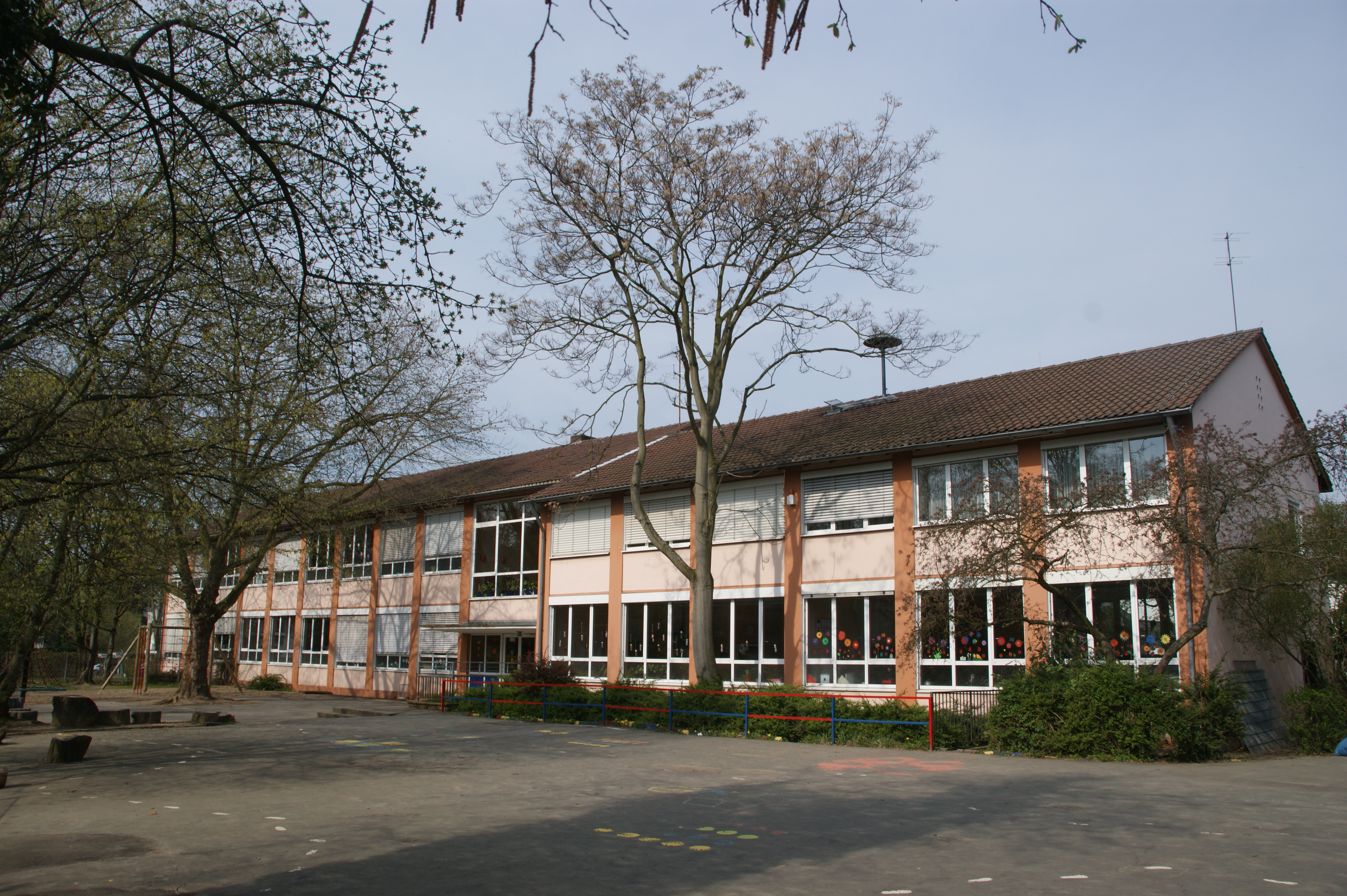 Johann-Lemmerz-Grundschule, Paul-Lemmerz-Straße 1, Königswinter